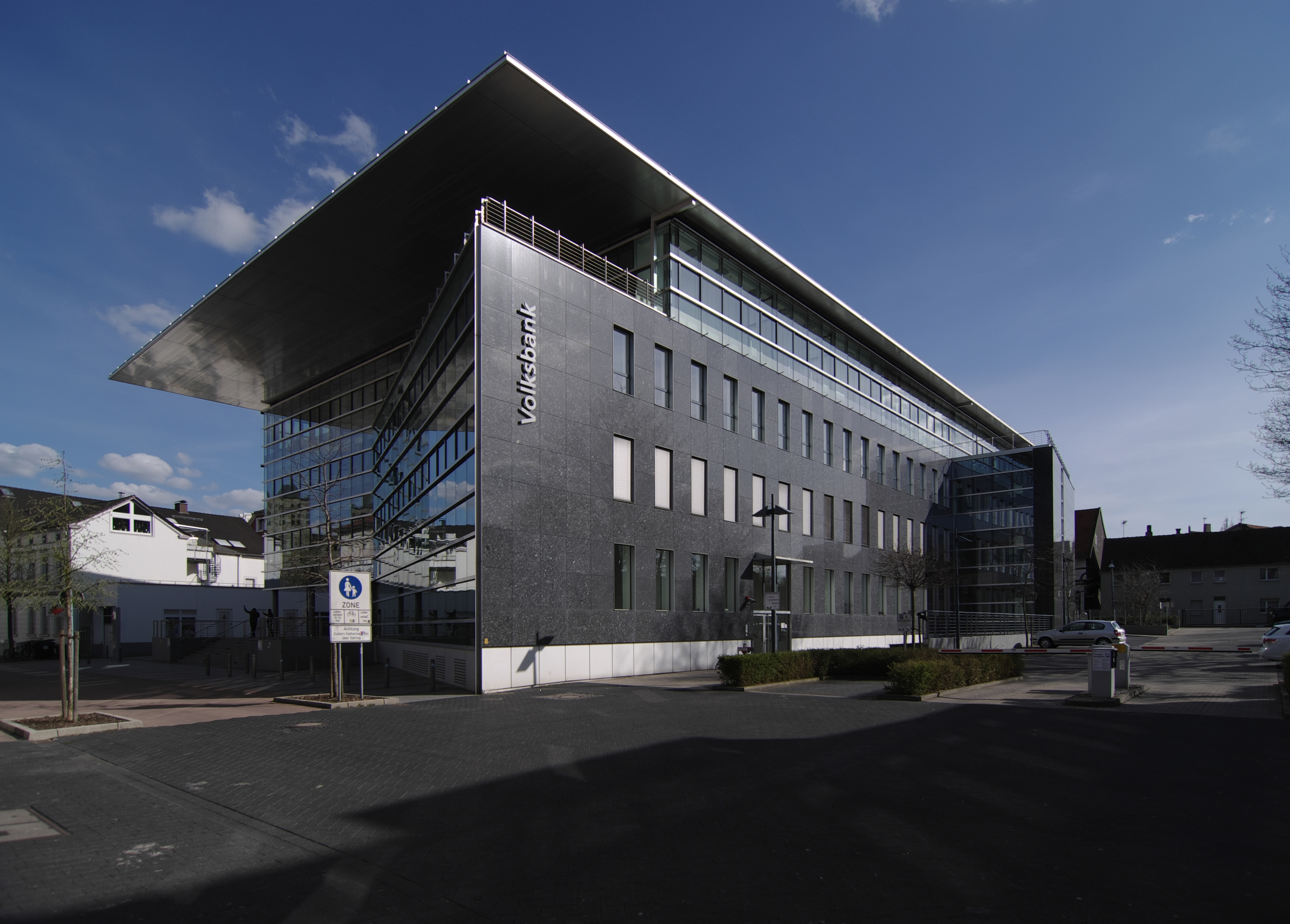 Volksbank Unna am Nordring